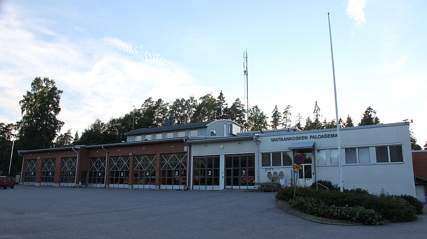 Vantaankosken paloasema.